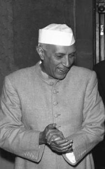 Factual corrections and alternative descriptions are encouraged separately from the original description. Additionally errors can be reported at this page to inform the Bundesarchiv. Original historic description: Indien, Otto Grotewohl bei Ministerpräsident Nehru Zentralbild/Heilig 27.1.59 Ministerpräsident Grotewohl bei Ministerpräs bcggffd grdetsfgsdeident Nehru Ministerpräsident Otto Grotewohl und der indische Ministerpräsident Nehru trafen am 12.1.59 zu einer Unterredung zusammen. Das Gespräch währte drei Stunden und verlief sehr herzlich. UBz.: Ministerpräsident Nehru (links) im freundschaftlichen Gespräch mit Ministerpräsident Otto Grotewohl (links im Hintergrund) der Stellvertreter des Vorsitzenden des Ministerrates und Minister für Auswärtige Angelegenheiten, Dr. Lothar Bohlz. Abgebildete Personen: * Grotewohl, Otto: Ministerpräsident, stellvertretender Staatsratsvorsitzender, DDR * Nehru, Jawaharlal Pandit: Premierminister, Präsident der Kongresspartei, Indien